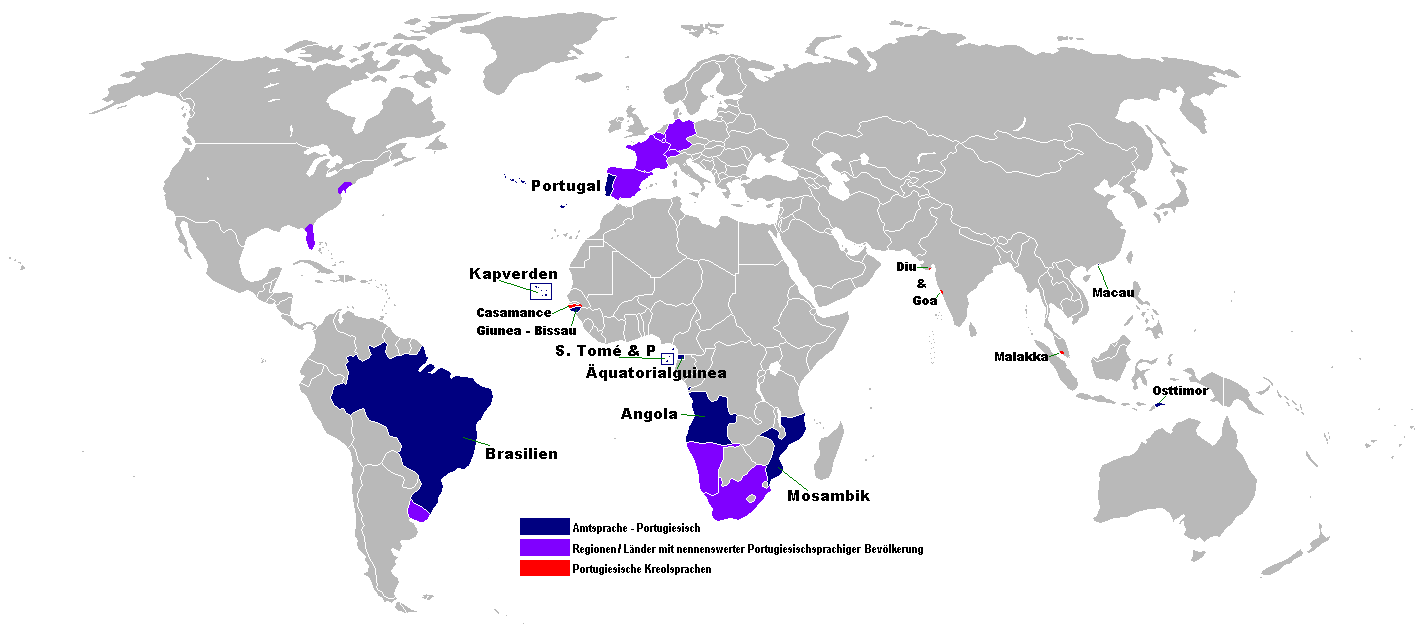 Karte der portugiesischsprachigen Welt